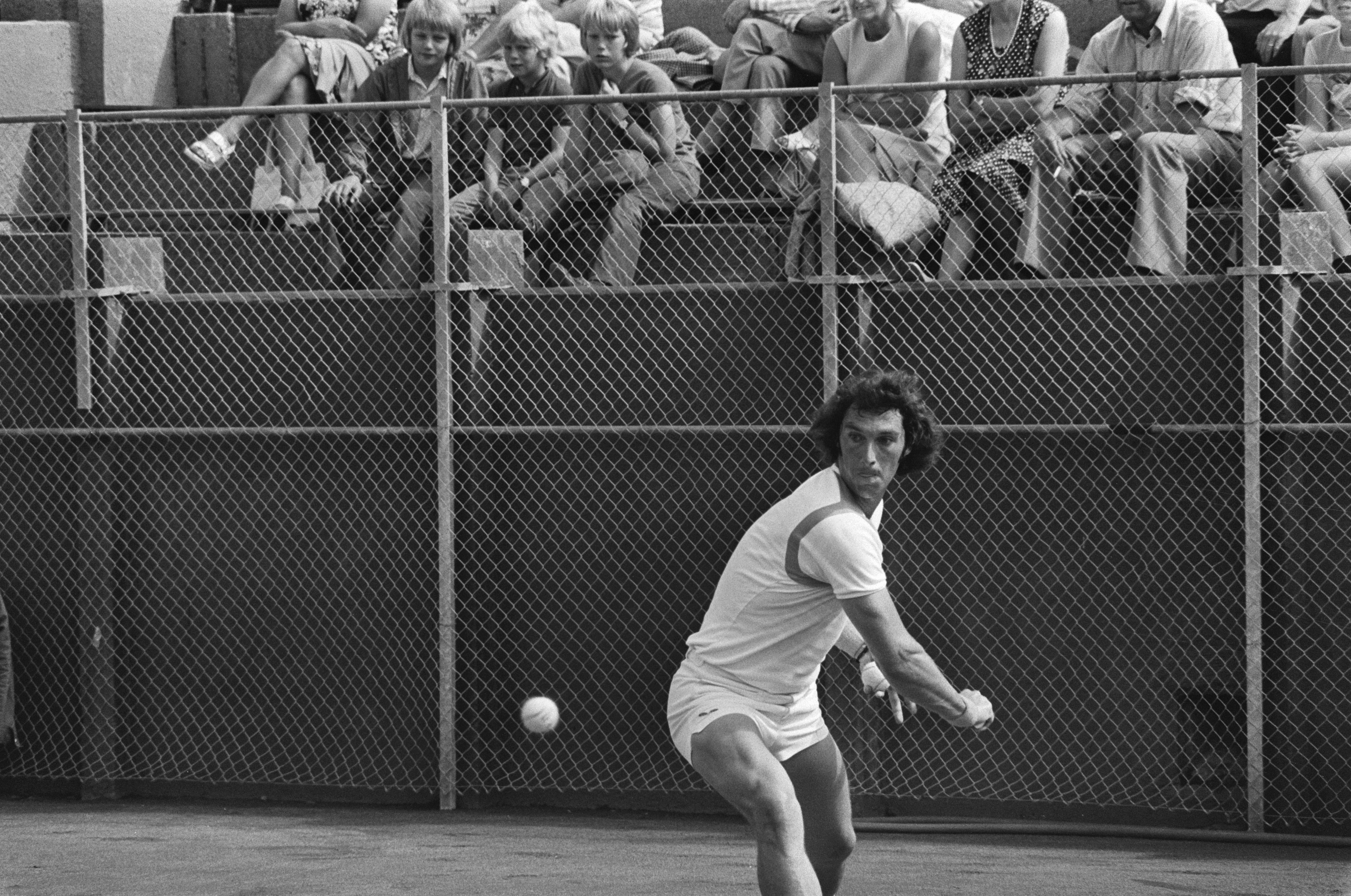 Collectie / Archief : Fotocollectie Anefo Reportage / Serie : [ onbekend ] Beschrijving : Nationale tenniskampioenschappen te Scheveningen; Jan Hordijk in actie Datum : 16 augustus 1974 Locatie : Scheveningen, Zuid-Holland Trefwoorden : kampioenschappen, tennis Persoonsnaam : Hordijk, Jan Fotograaf : Mieremet, Rob / Anefo Auteursrechthebbende : Nationaal Archief Materiaalsoort : Negatief (zwart/wit) Nummer archiefinventaris : bekijk toegang 2.24.01.05 Bestanddeelnummer : 927-3895